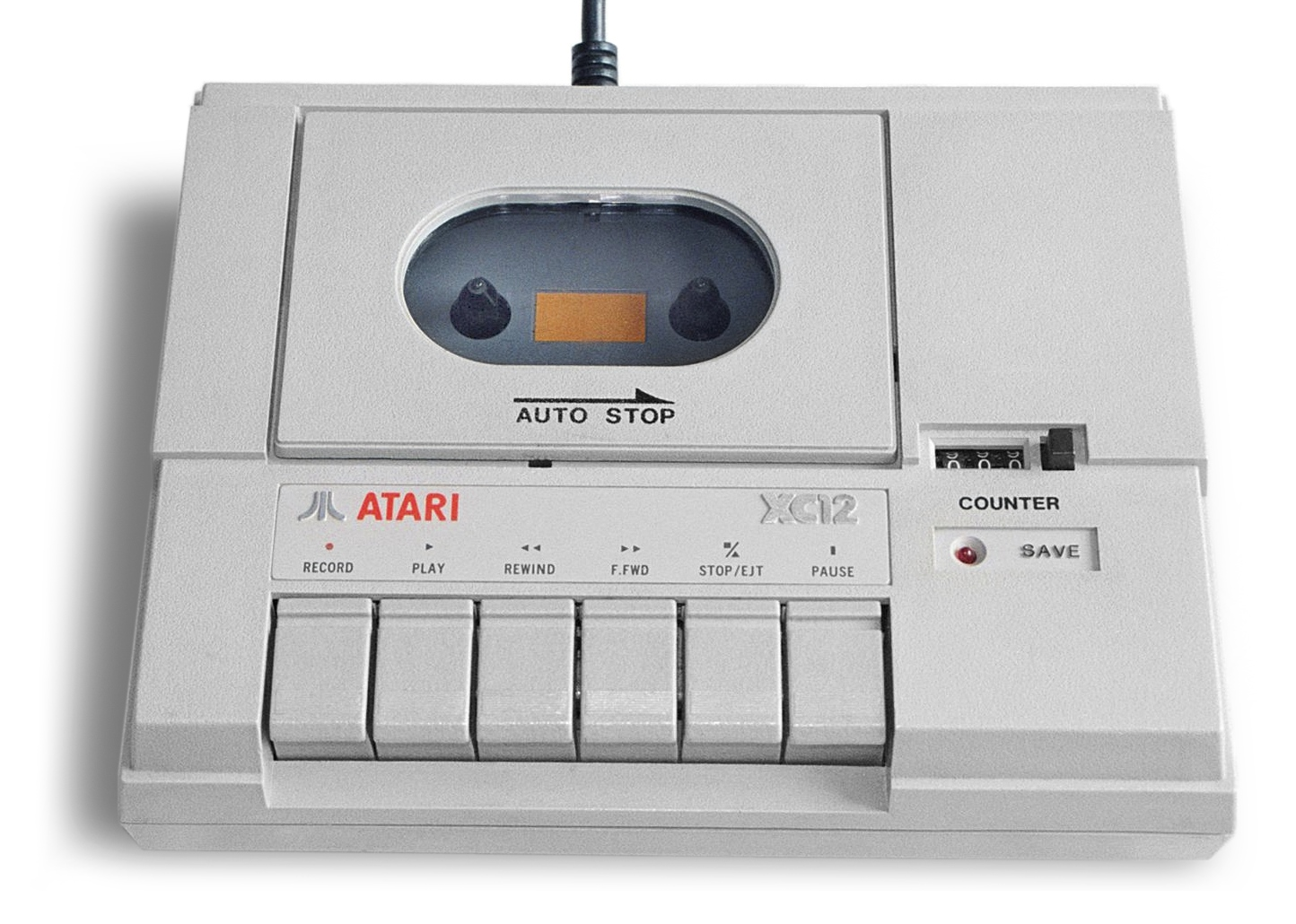 Atari XC12 data recorder (for programs on cassette)